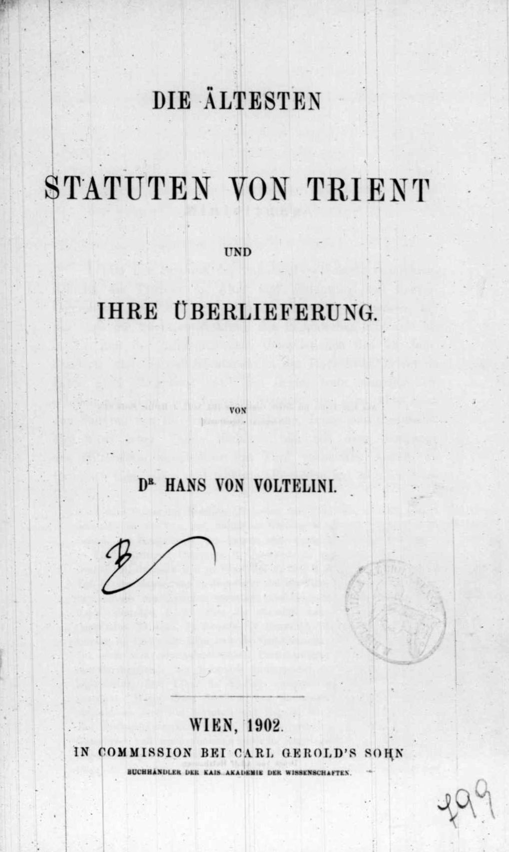 Frontespizio